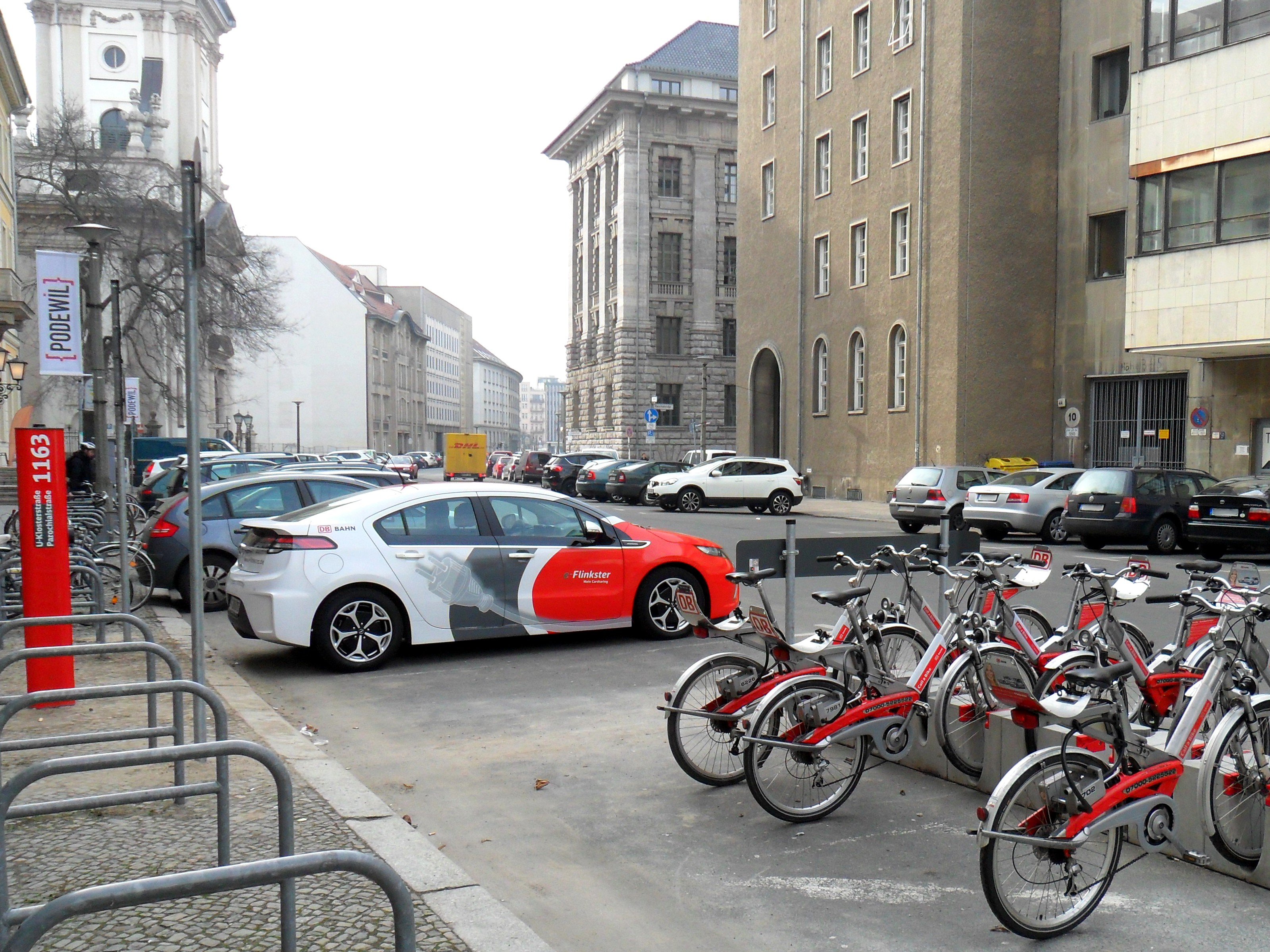 Elektrisches Carsharing-Auto "e-Flinkster" neben Fahrradverleihstation "Call a Bike in der Berliner Klosterstraße